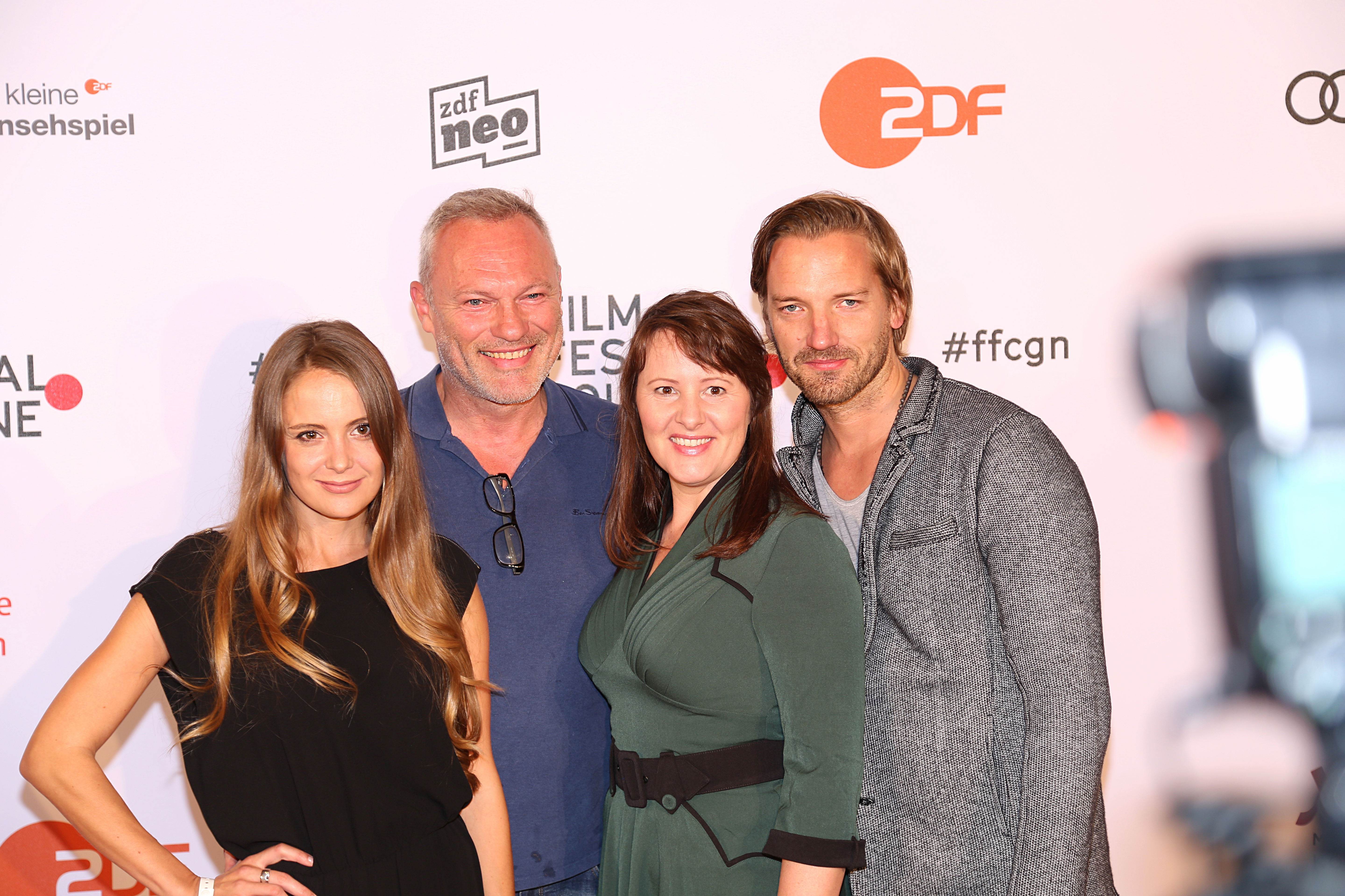 Katrin Wolter, Klaus Nierhoff, Nina Vorrodt, Lars Oberhäuser bei der Verleihung der "Film Festival Cologne Awards 2017".